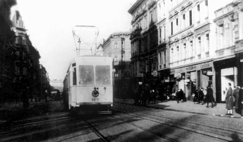 Obecna al.Wyzwolenia w 1942 roku w Szczecinie